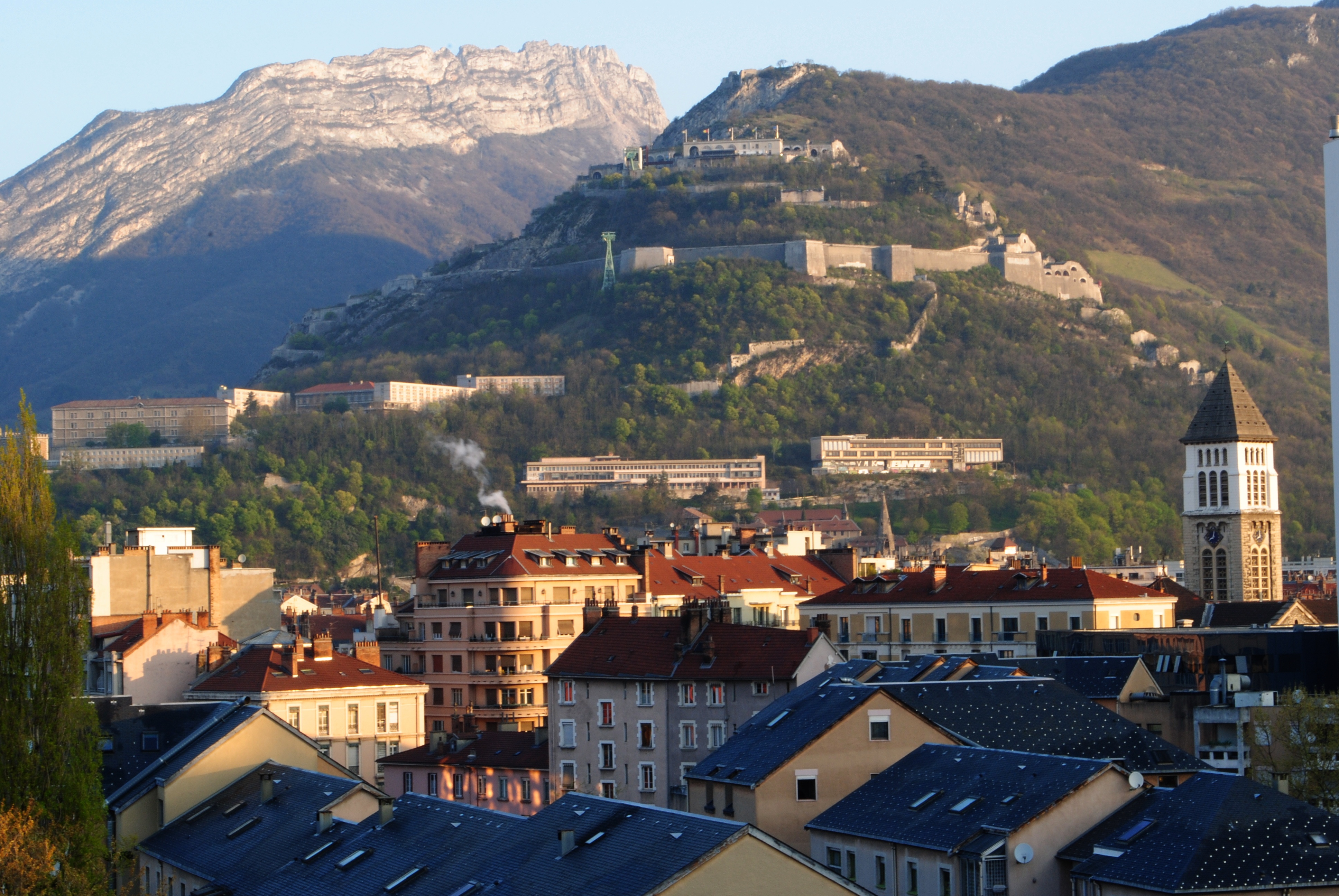 La Bastille de Grenoble vue d'un bâtiment à coté du parc mistral (Résidence Galilée) pendant un matin au printemps 2012.